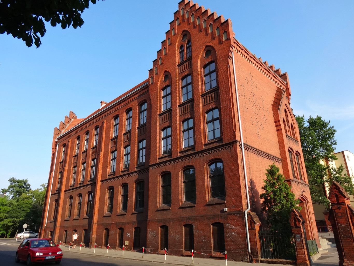 Budynek dawnej szkoły powszechnej, Bydgoszcz pl. Kościeleckich 8, zbud. 1890-1892, od 2010 w gestii Uniwersytetu Kazimierza Wielkiego